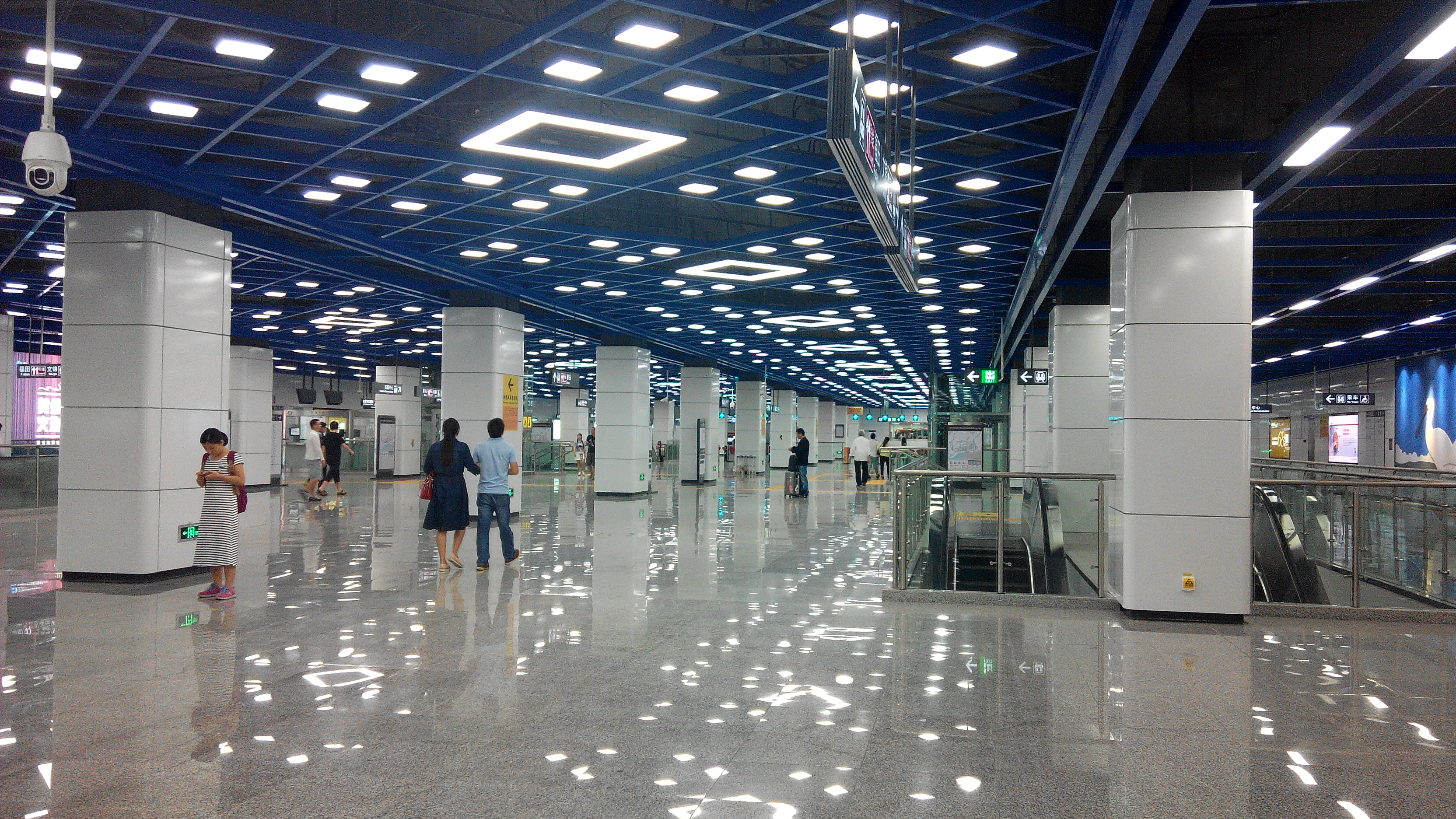 深圳地铁9、11号线 红树湾南站站厅